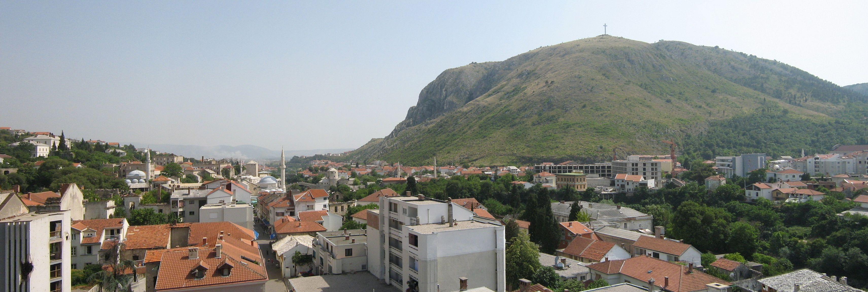 Mostar